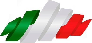 Escudo del gobierno de Huamantla 2017-2021